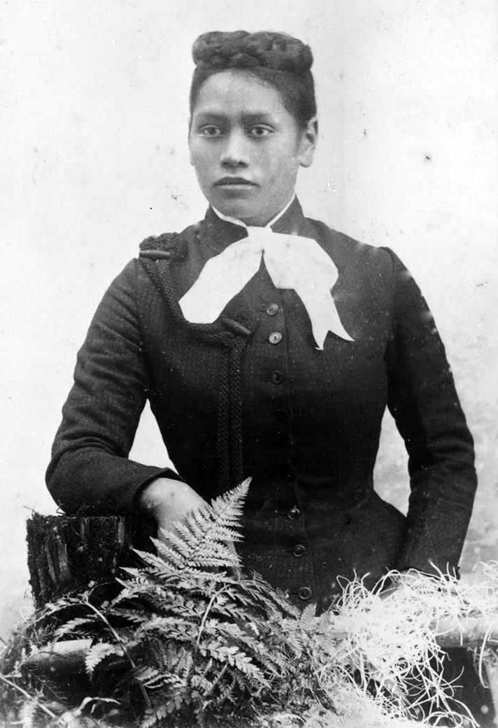 Meri Te Tai Mangakāhia (1868-1920), circa 1890. Meri was a member of the Kotahitanga (Māori Parliament) movement.